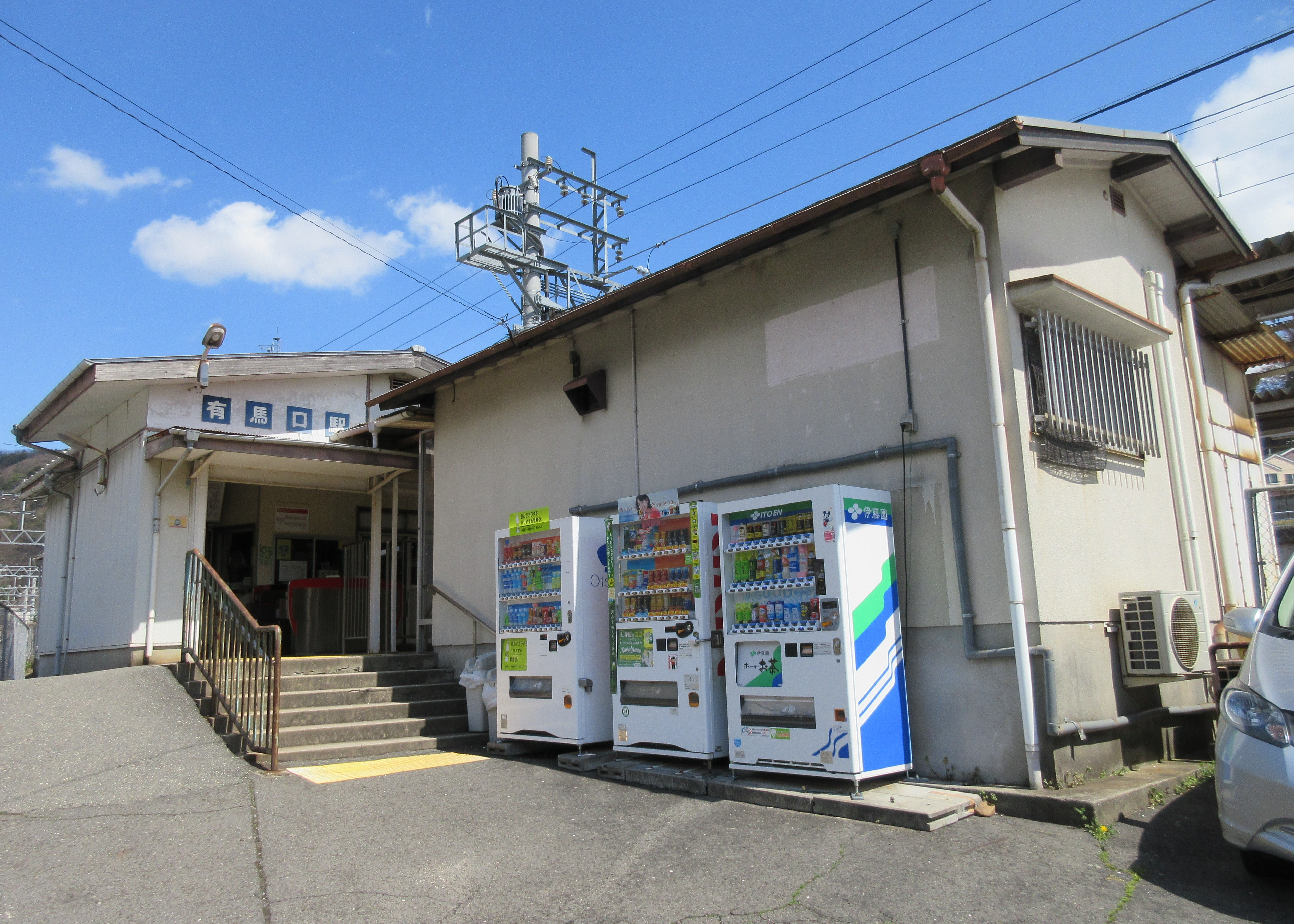 神戸電鉄有馬口駅